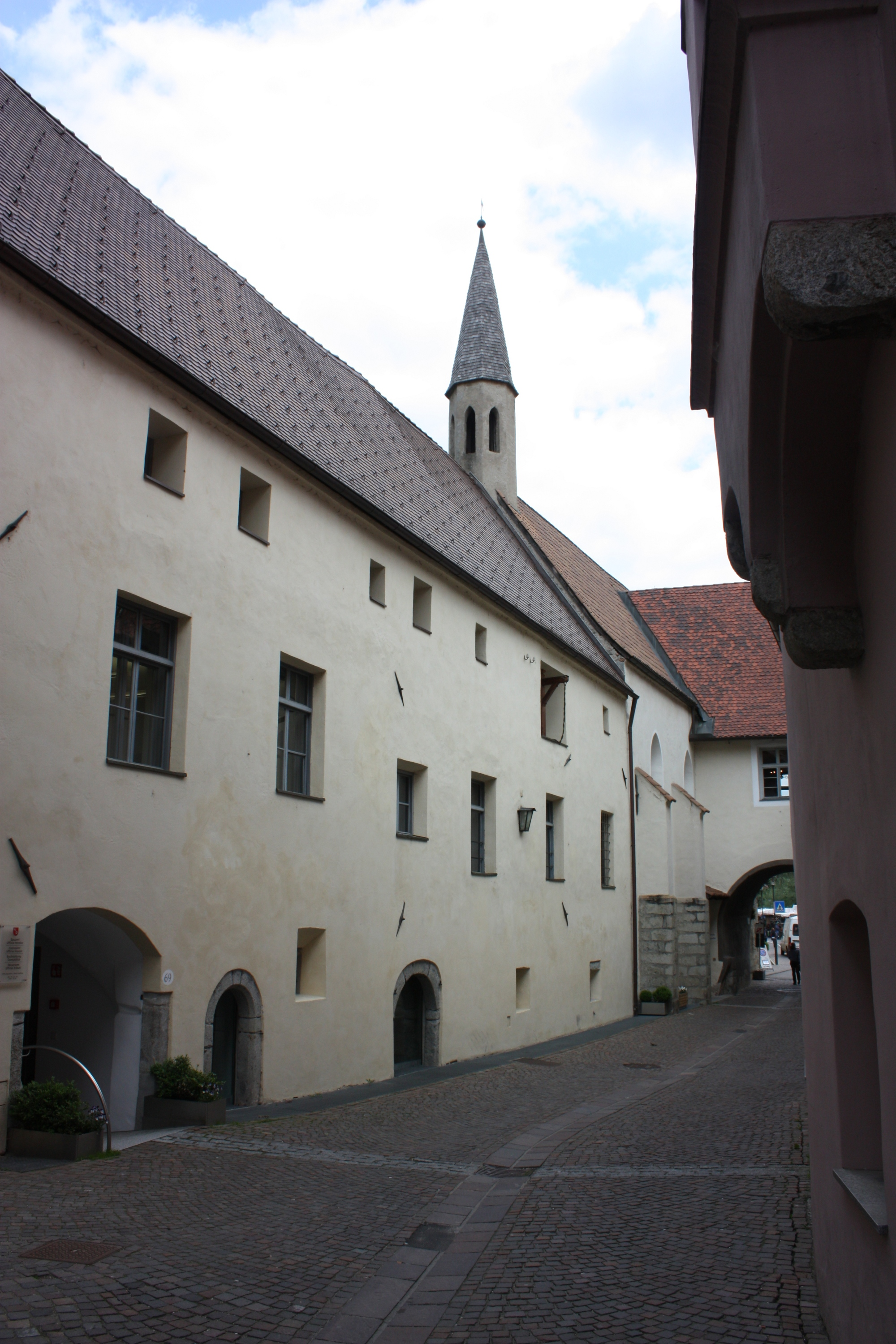 Klausen, Südtirol: Apostelkirche und Hospitalbau am Brixner Tor